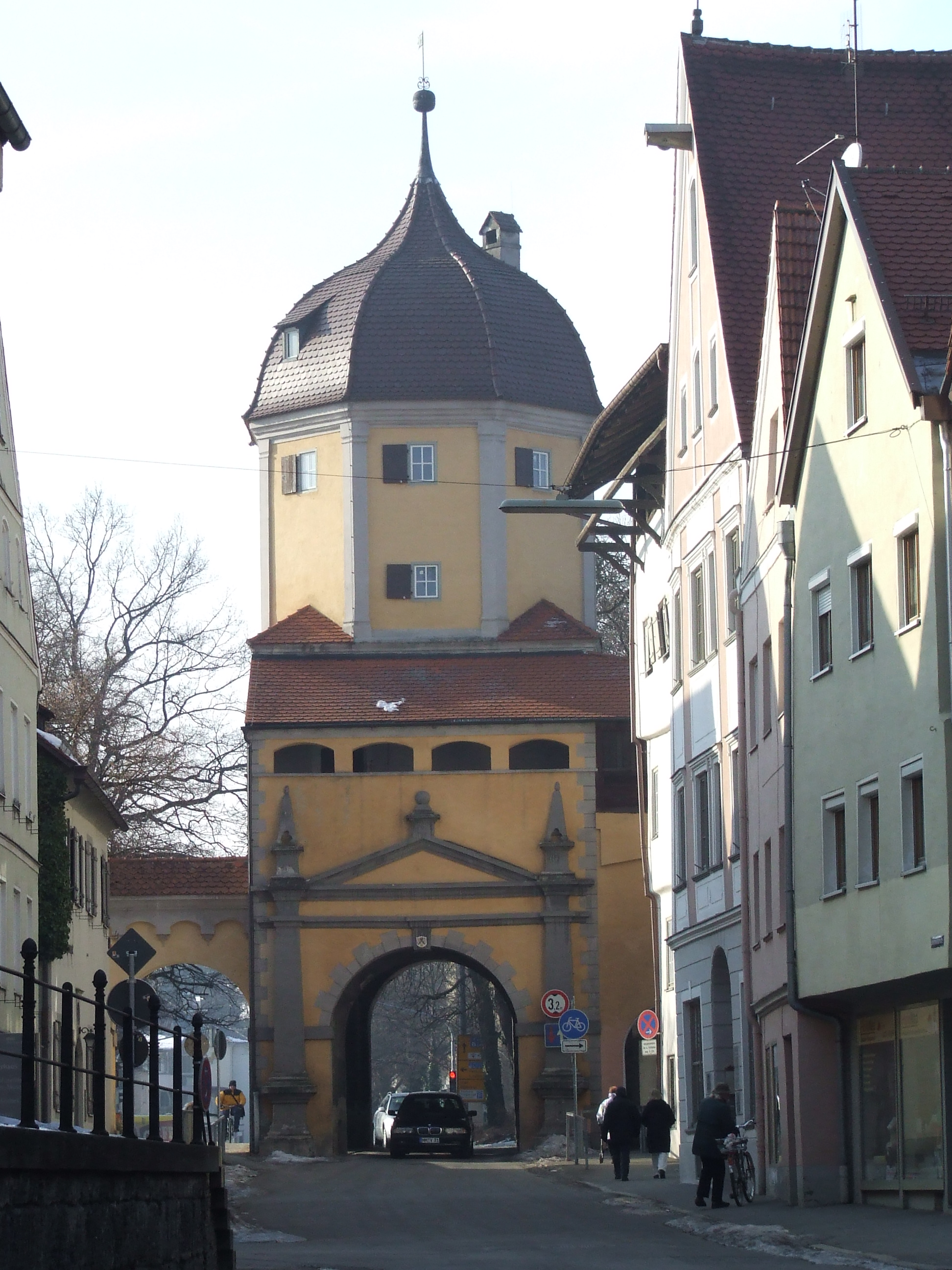 Memmingen, das Westertor Quelle: Selbst fotografiert am 29. Januar 2006 von User:Neitram